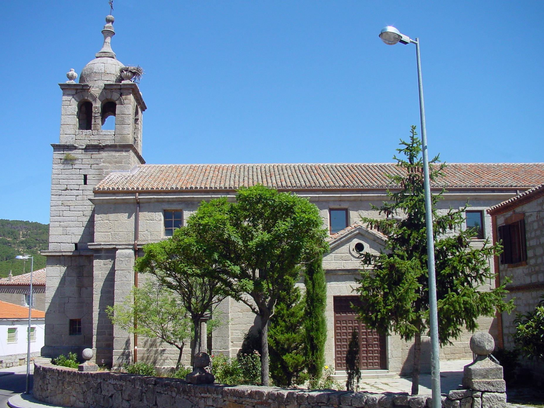 Iglesia en Zarzalejo.